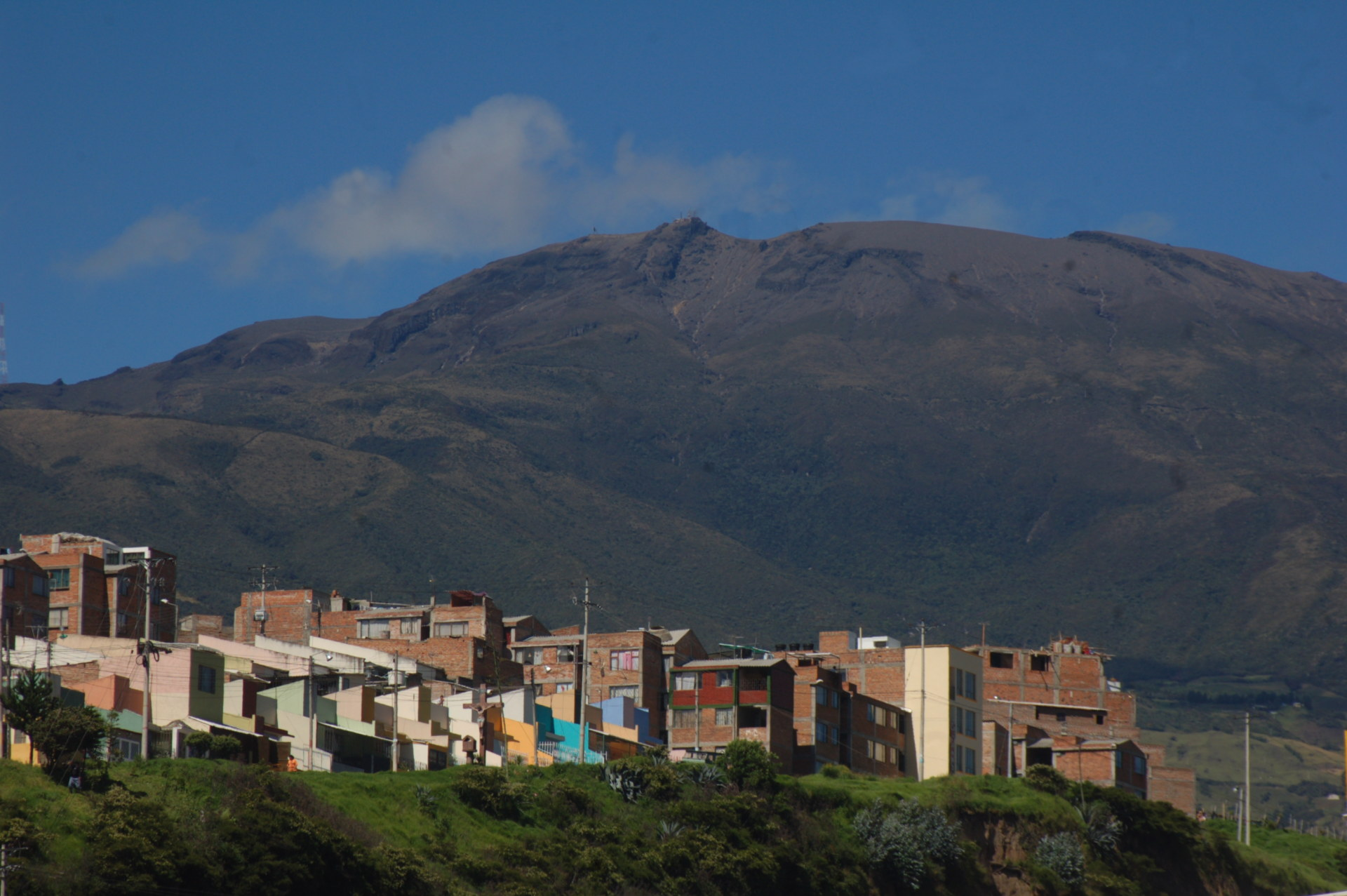 Imagen de la cima del volcán Galeras desde el oriente del edificio volcánico (San Juan de Pasto)